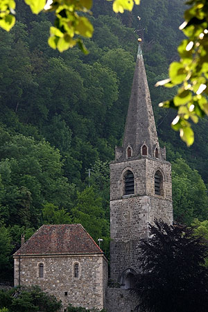 Saint-Vincent, Stadtkirche von Montreux (Les Planches)